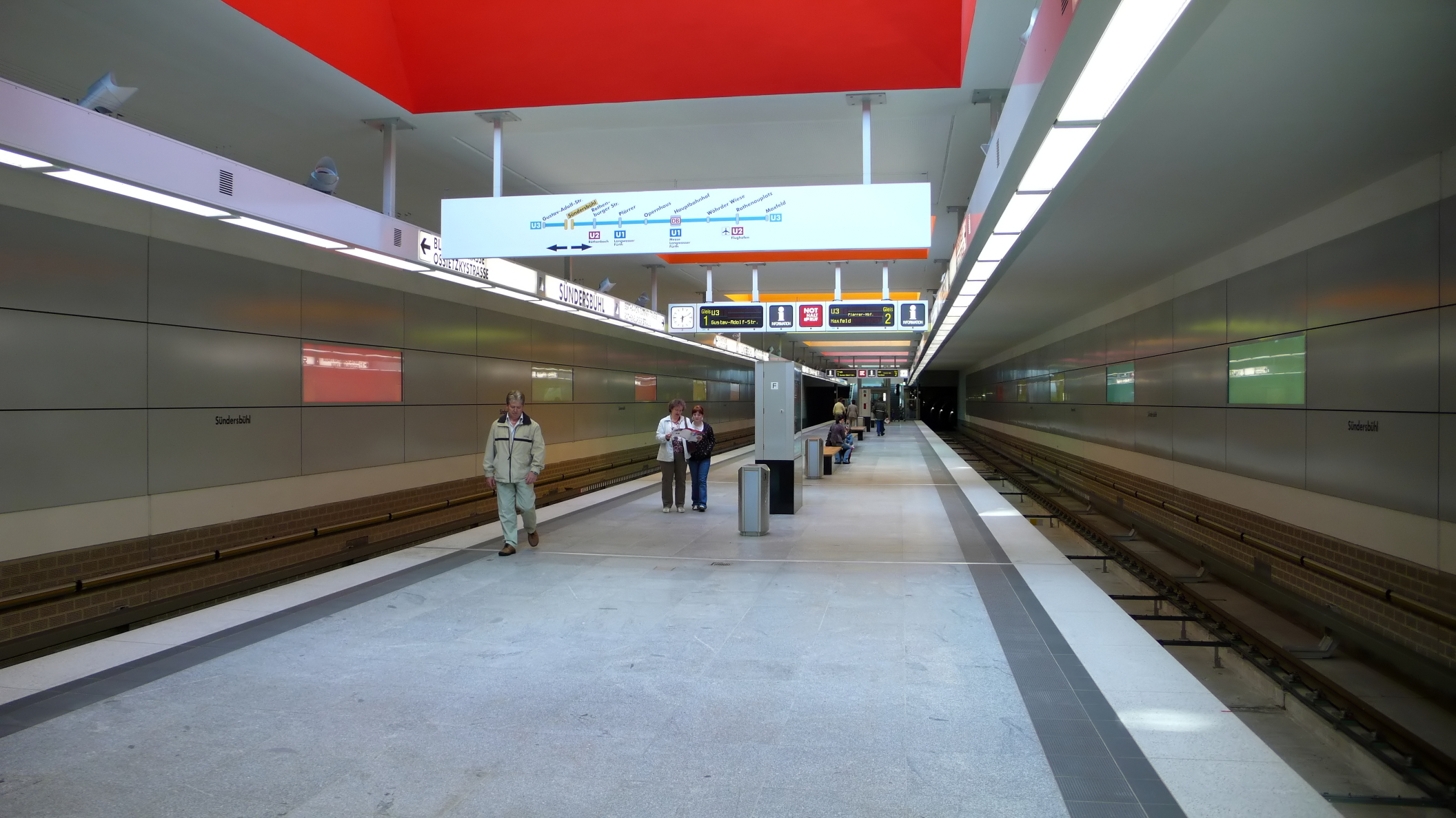 U-Bahnhof Sündersbühl der U-Bahn Nürnberg, Bahnsteigebene, Blick von Westen